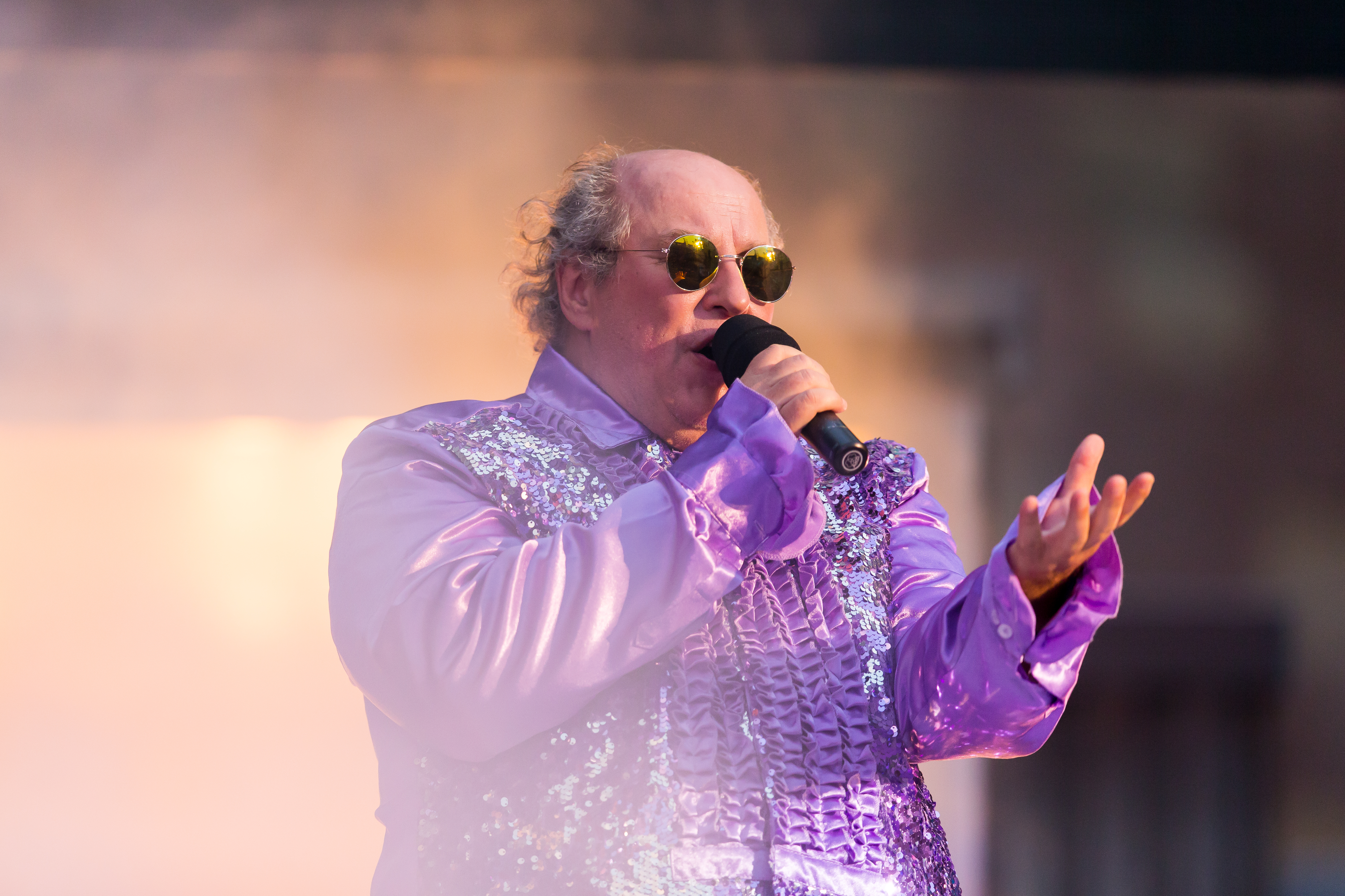 2016: Uraufführung: "GOLD. Der Film der Nibelungen" Regie: Nuran David Calis Autor: Albert Ostermaier Intendant: Nico Hofmann --- Ensemble: Produzent Konstantin Trauer: Uwe Ochsenknecht Regisseur Arsenij Kubik: Vladimir Burlakov Drehbuchautor Charlie P. Weide: Josef Ostendorf Society Reporter Peter Scheumer: Dominic Raacke Kamerafrau "the eye": Anna Rot Setdesignerin "set": Joy Maria Bai Assistentin des Produzenten Carmen: Alexandra Kamp Maskenbildnerin Sueyla Blume : Ayse Bosse die Ältere Kriemhild Karina Bergmann: Katja Weitzenböck die Jüngere Kriemhild Simone Gehel: Constanze Wächter die Ältere Brünhild Lotte Jünger: Michaela Steiger die Jüngere Brünhild Nathalie Aurun: Dennenesch Zoudé Siegfried Mohamad Söder: Ismail Deniz Hagen René Inner: Sascha Göpel Gunther Klaus Castel: Maximilian Laprell Bürgermeister Franz Koppoler: Heiner Lauterbach during Nibelungenfestspiele "GOLD. Der Film der Nibelungen" at Wormser Kaiserdom, Worms, Rheinland Pfalz, Germany on 2016-07-12, Photo: Sven Mandel